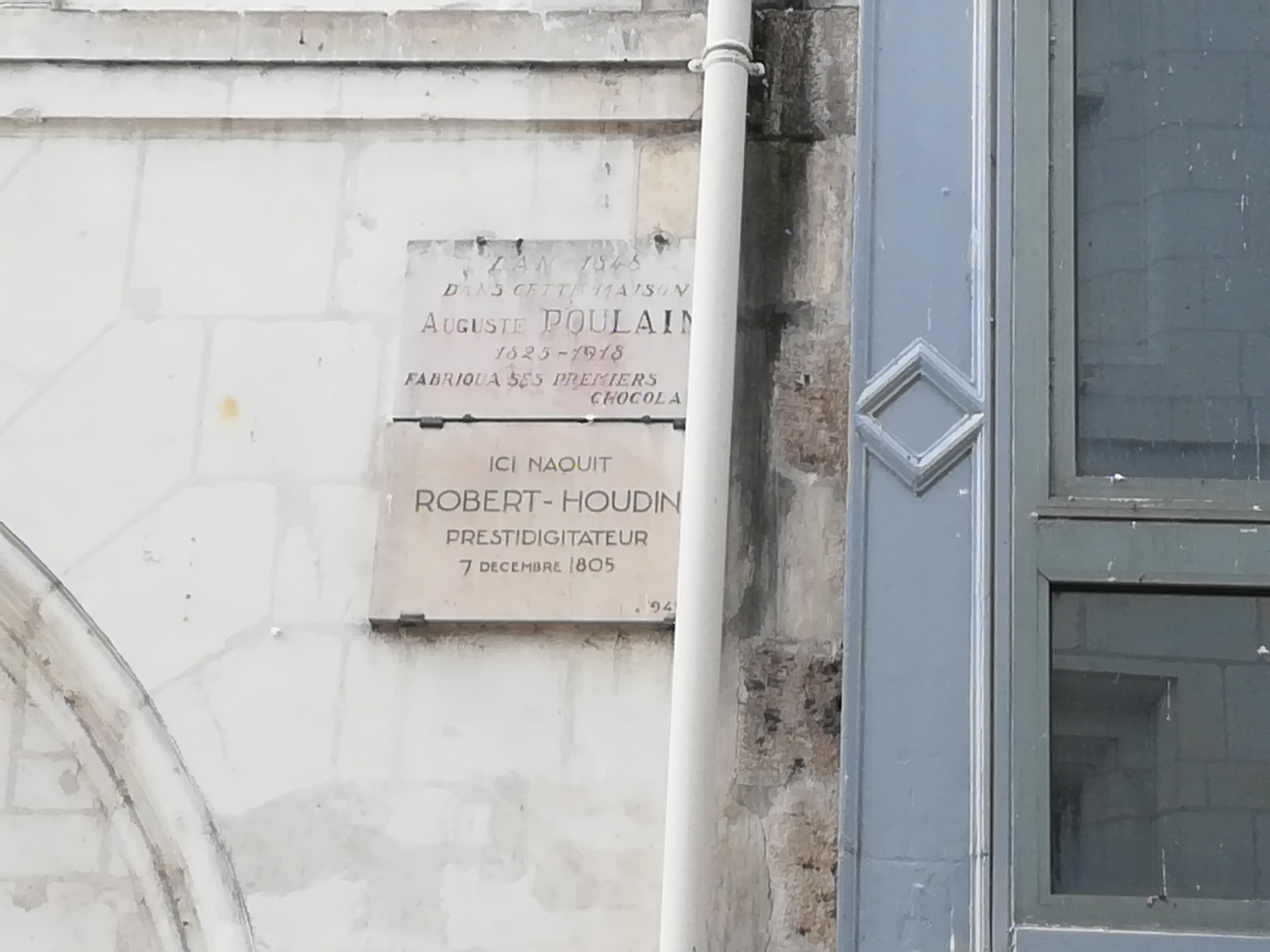 Plaques commémoratives dédiées au magicien Robert Houdin et au chocolatier Victor-Auguste Poulain, au n°4 de la rue Porte-Chartraine, à Blois, France.